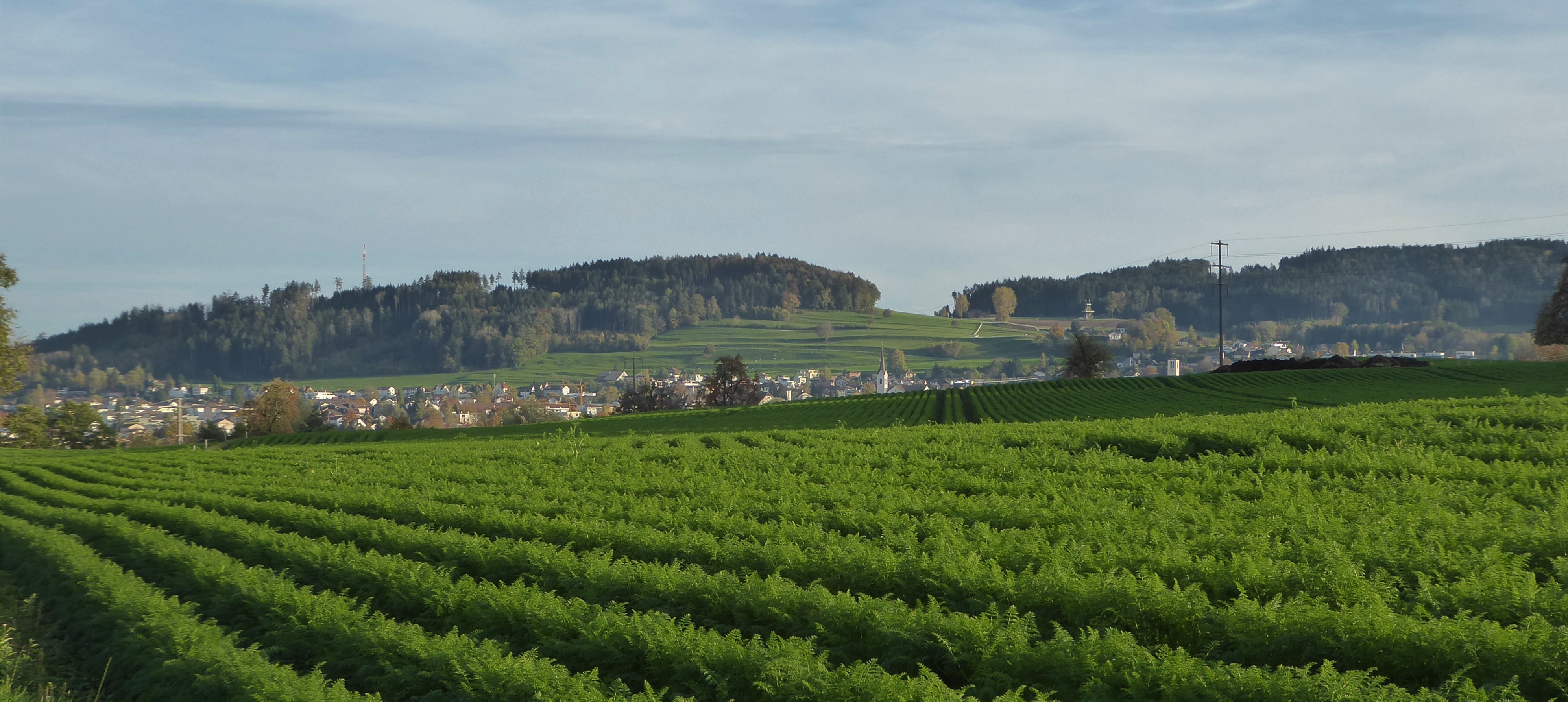 Blick vom Freudenberg (Münchwilen) auf Sirnach